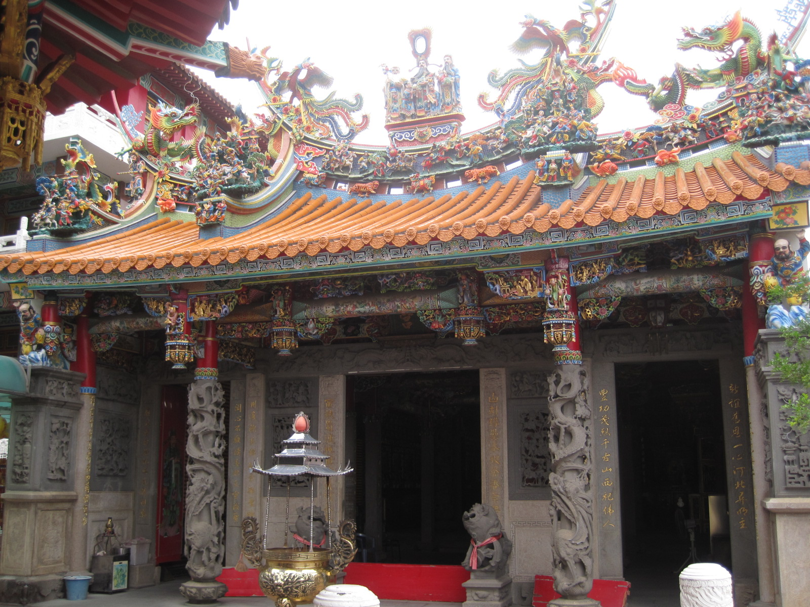 山西宮太歲殿，為改建之前的舊廟